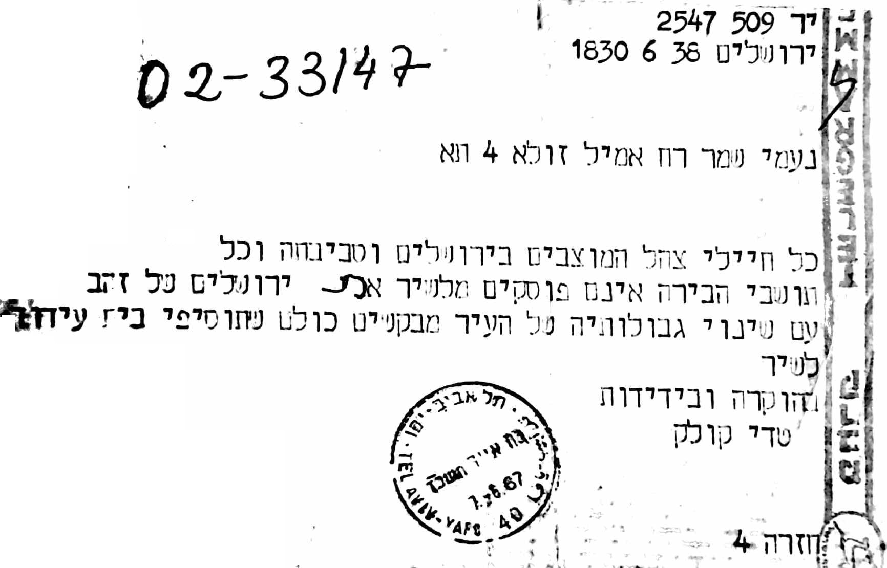 ירושלים של זהב מברק מטדי קולק עם בקשה להוסיף לשיר בית